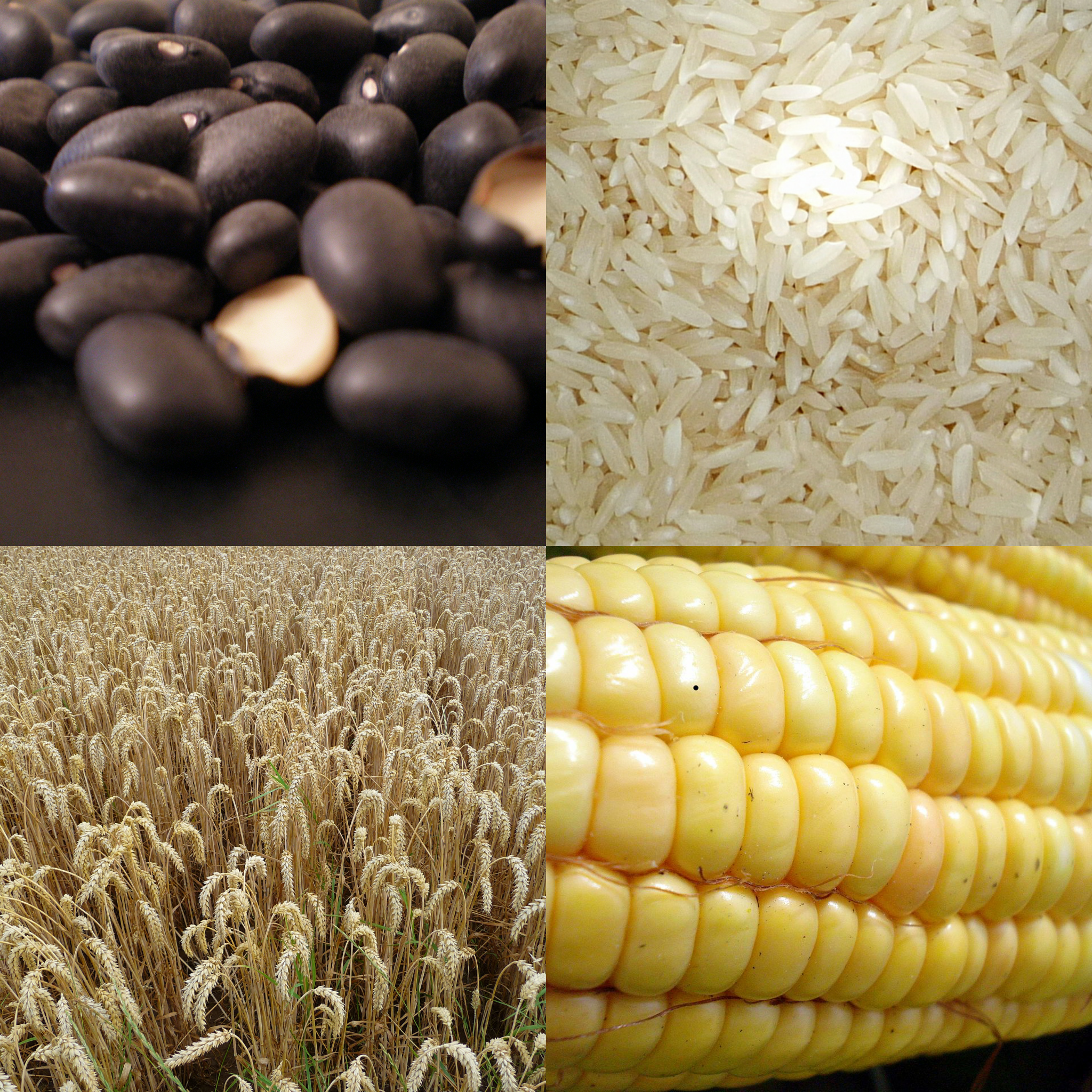 Foto montaje sobre los principales cereales